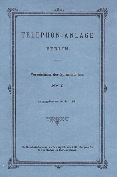 Umschlagseite des Berliner Telefonbuchs vom 14. Juli 1881